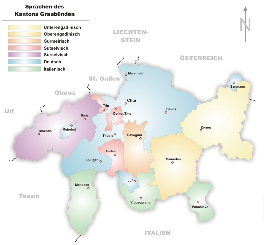 Sprachregionen im Kanton Graubünden, selbstgezeichnet von Tschubby